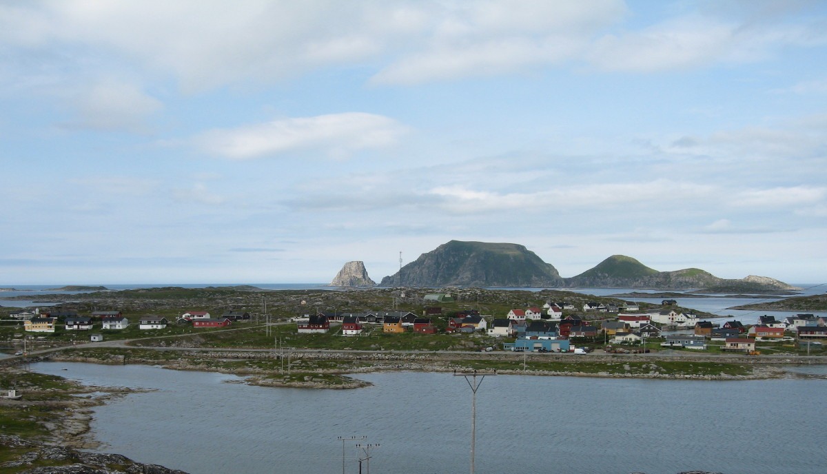 Gjesvær.